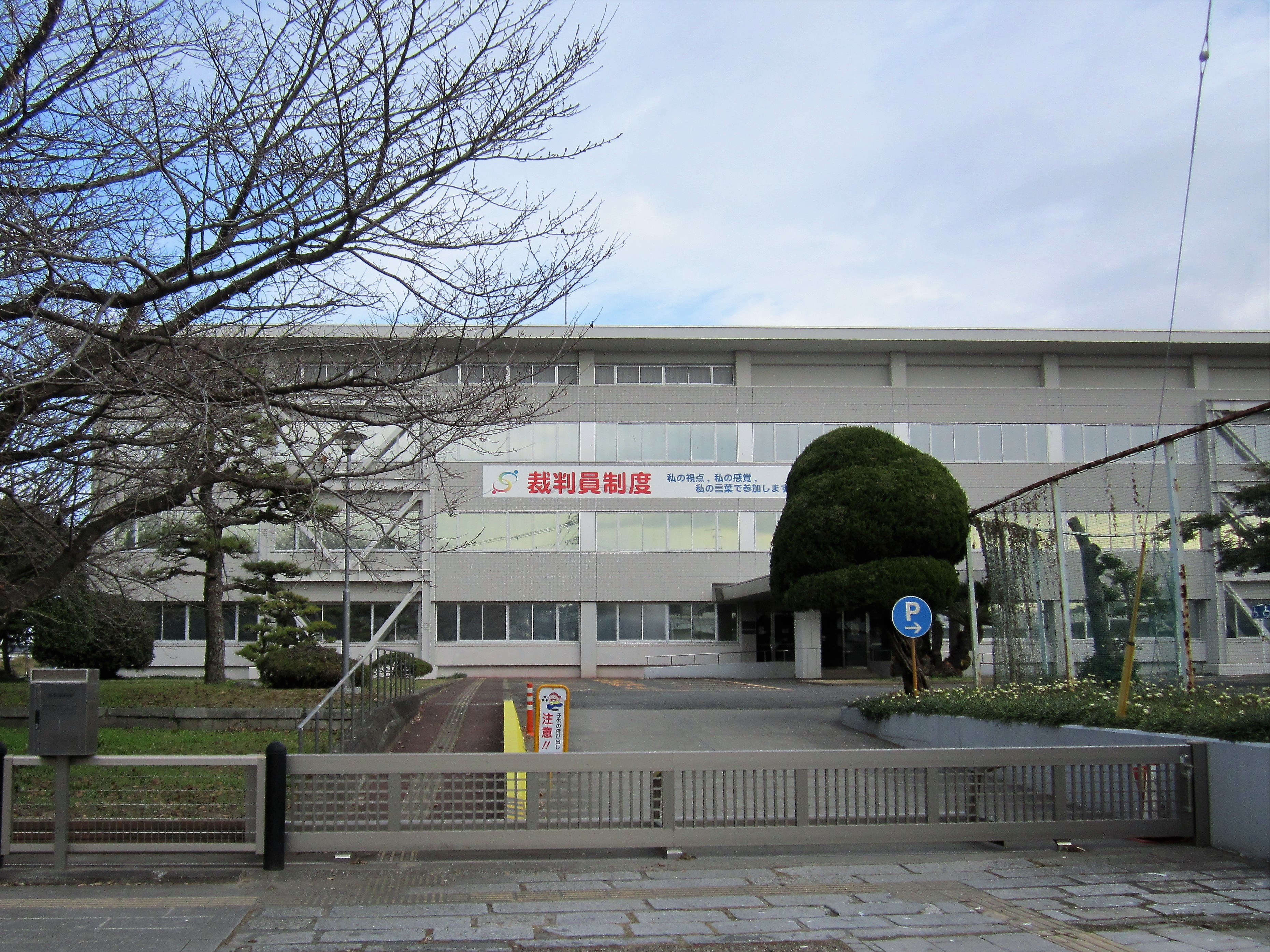 大分地方裁判所中津支部、大分家庭裁判所中津支部、中津簡易裁判所 Canon PowerShot A2200